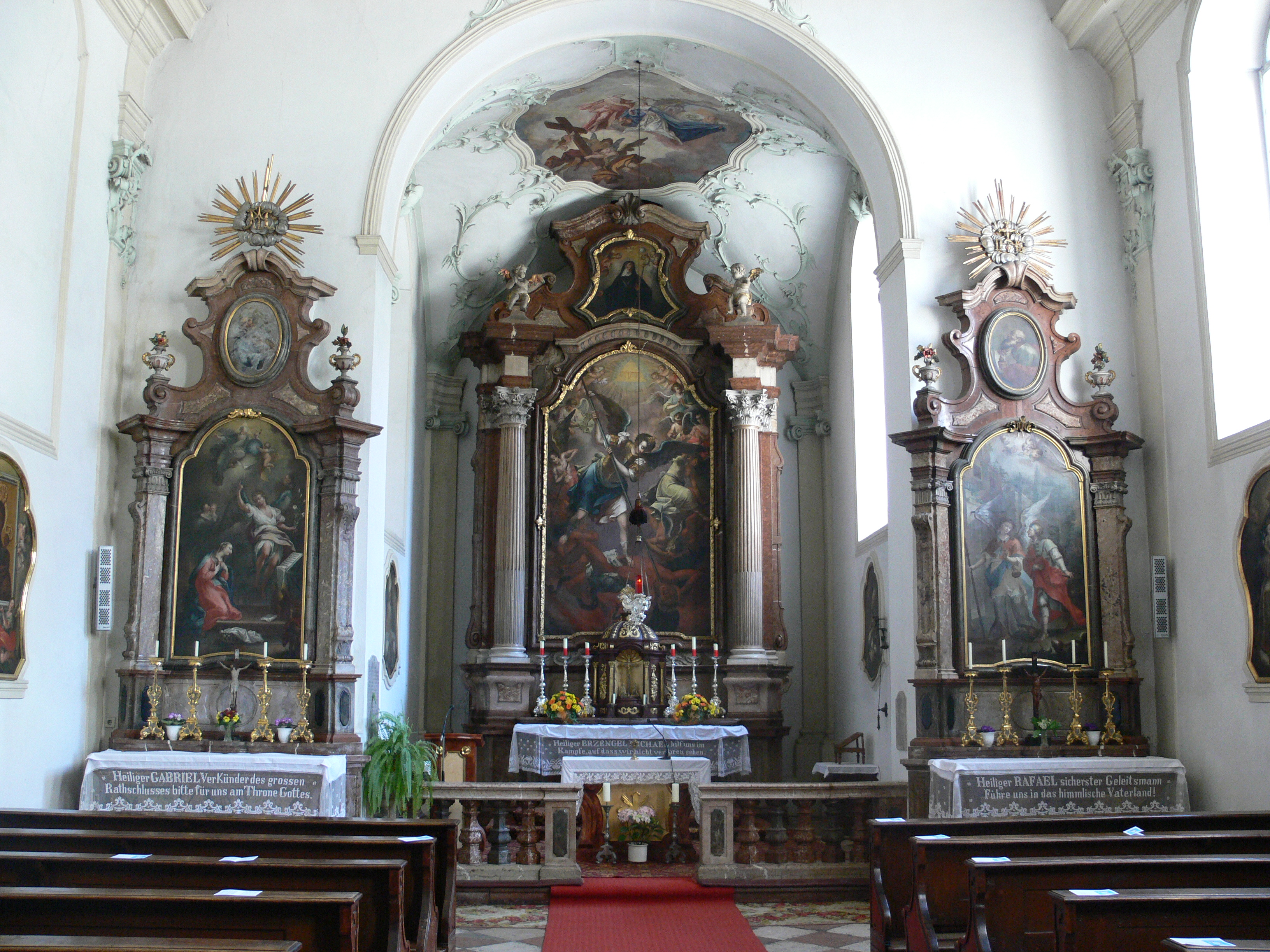 Michaelskirche (am Residenzplatz/Mozartplatz), Salzburg